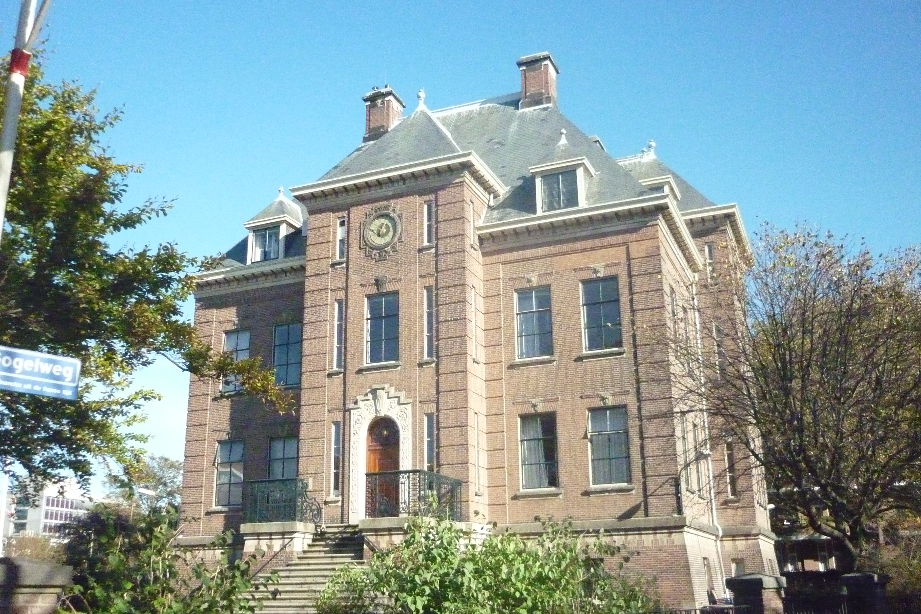 Alexander Gogelweg, Den Haag